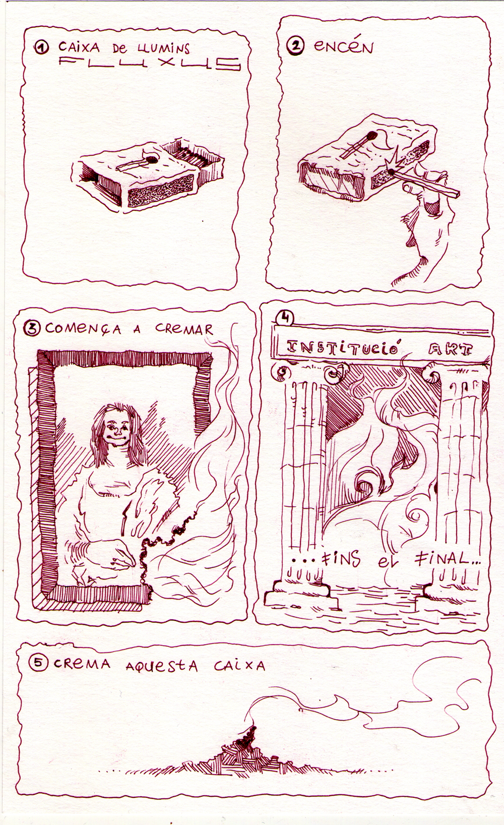 Il·lustració del caràcter anti-art de Fluxus